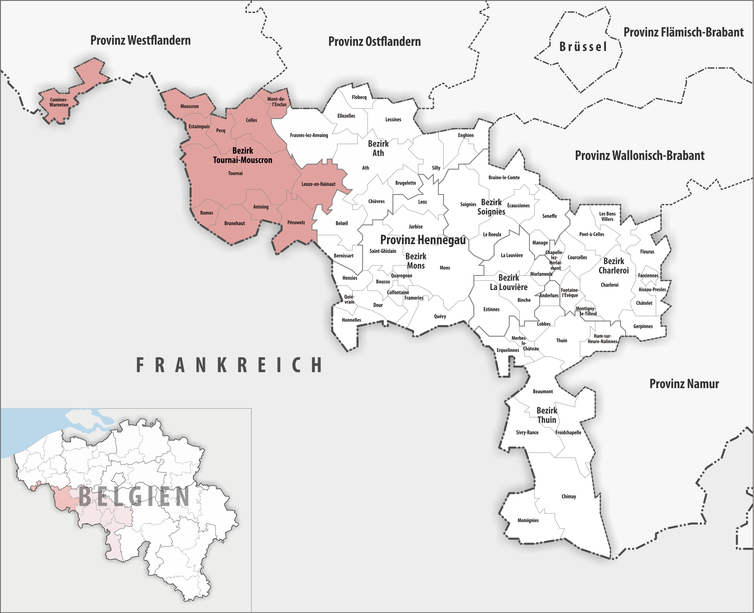 Lage des Bezirks Tournai-Mouscron